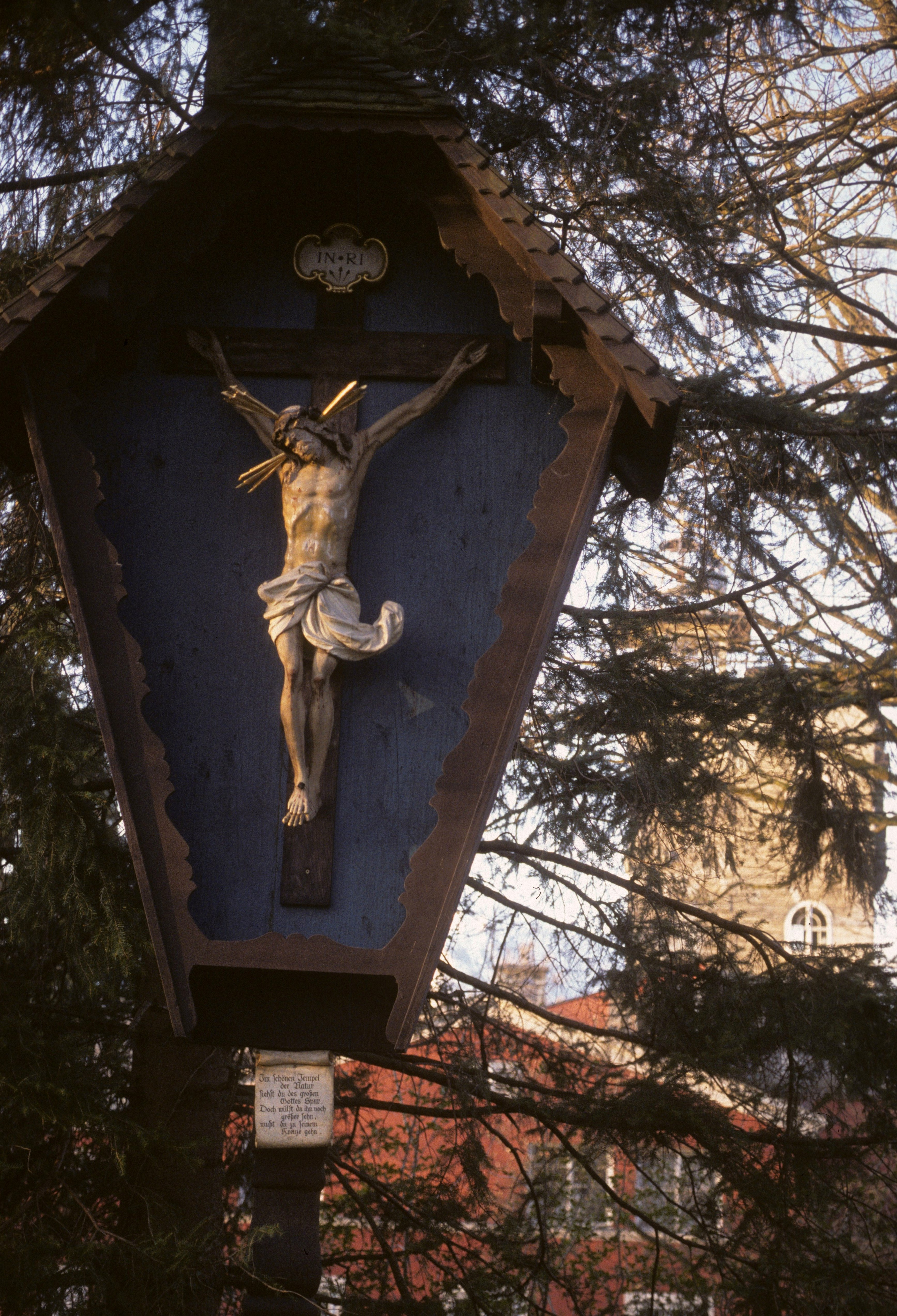 Katschtaler Kreuz auf der Karolinenhöhe des Mönchsberges (errichtet 1920)